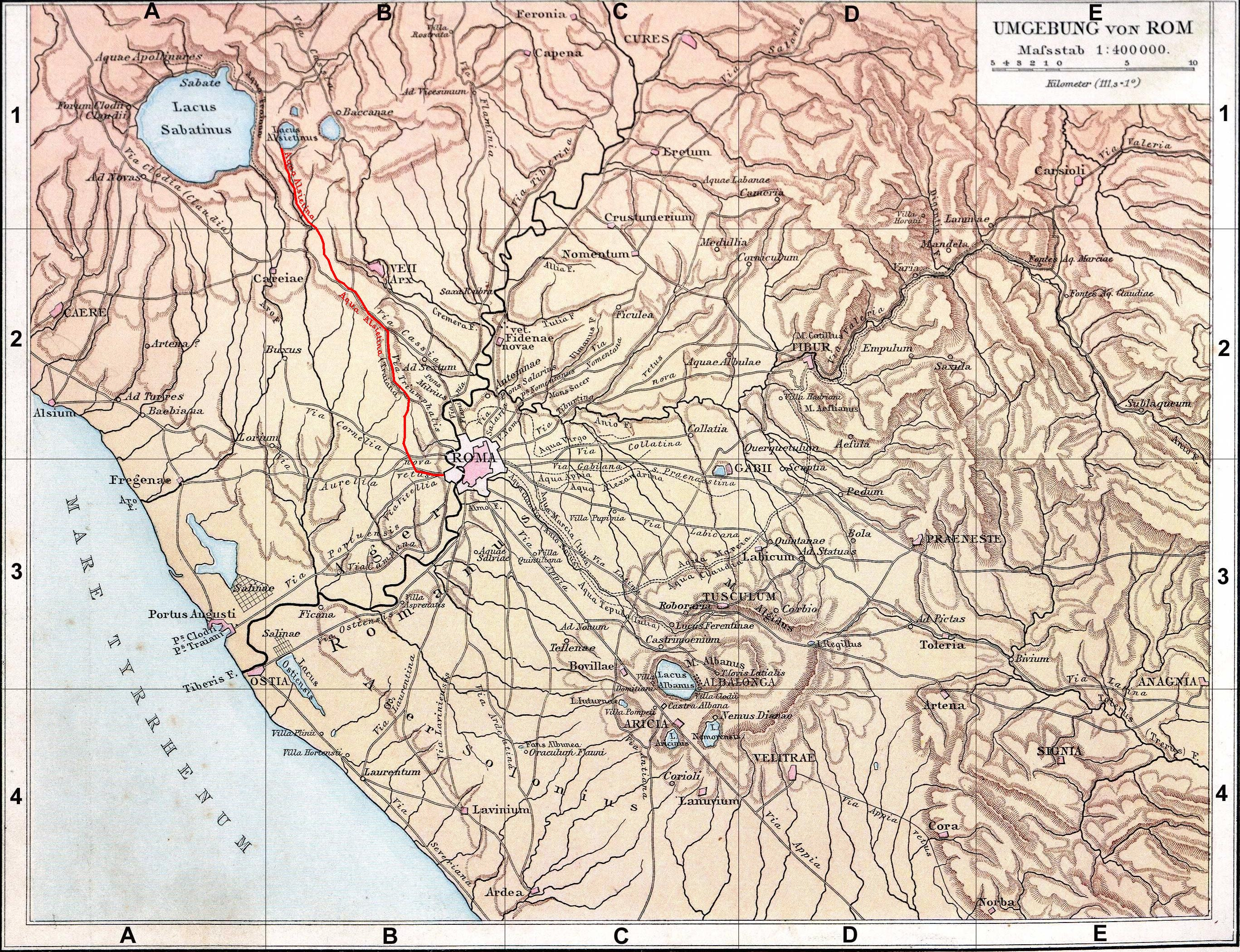 Fond de carte de 1886 (G. Droysens Allgemeiner Historischer Handatlas), libre de droit (Image:Rom_Umgebung.jpg), avec l'aqua appia en rouge.